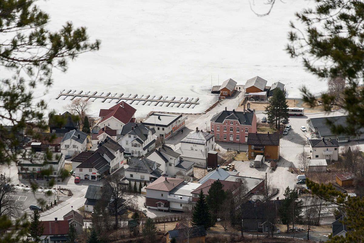 Kviteseidbyen sett fra Kongsbergdammen.